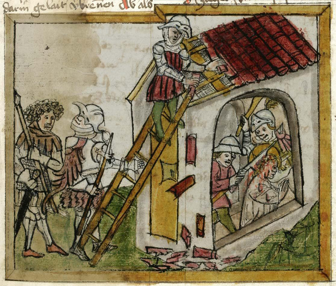 Der Martertod Wiboradas - Illustration aus Deutsche Heiligenleben,, Codex 602 der Stiftsbibliothek St. Gallen, S. 345